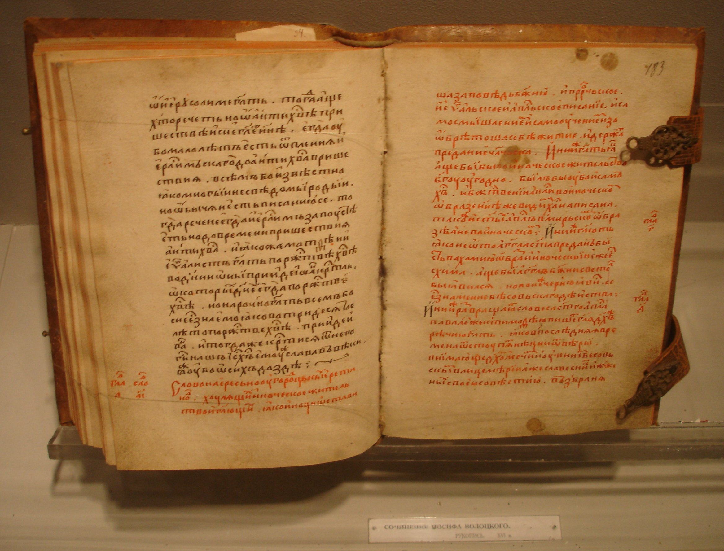 Сочинение Иосифа Волоцкого в Музее истории в Суздале. Writing of Joseph Volotsky in History Museum in Suzdal. Photo by User:.:Ajvol:., 2006-10-19